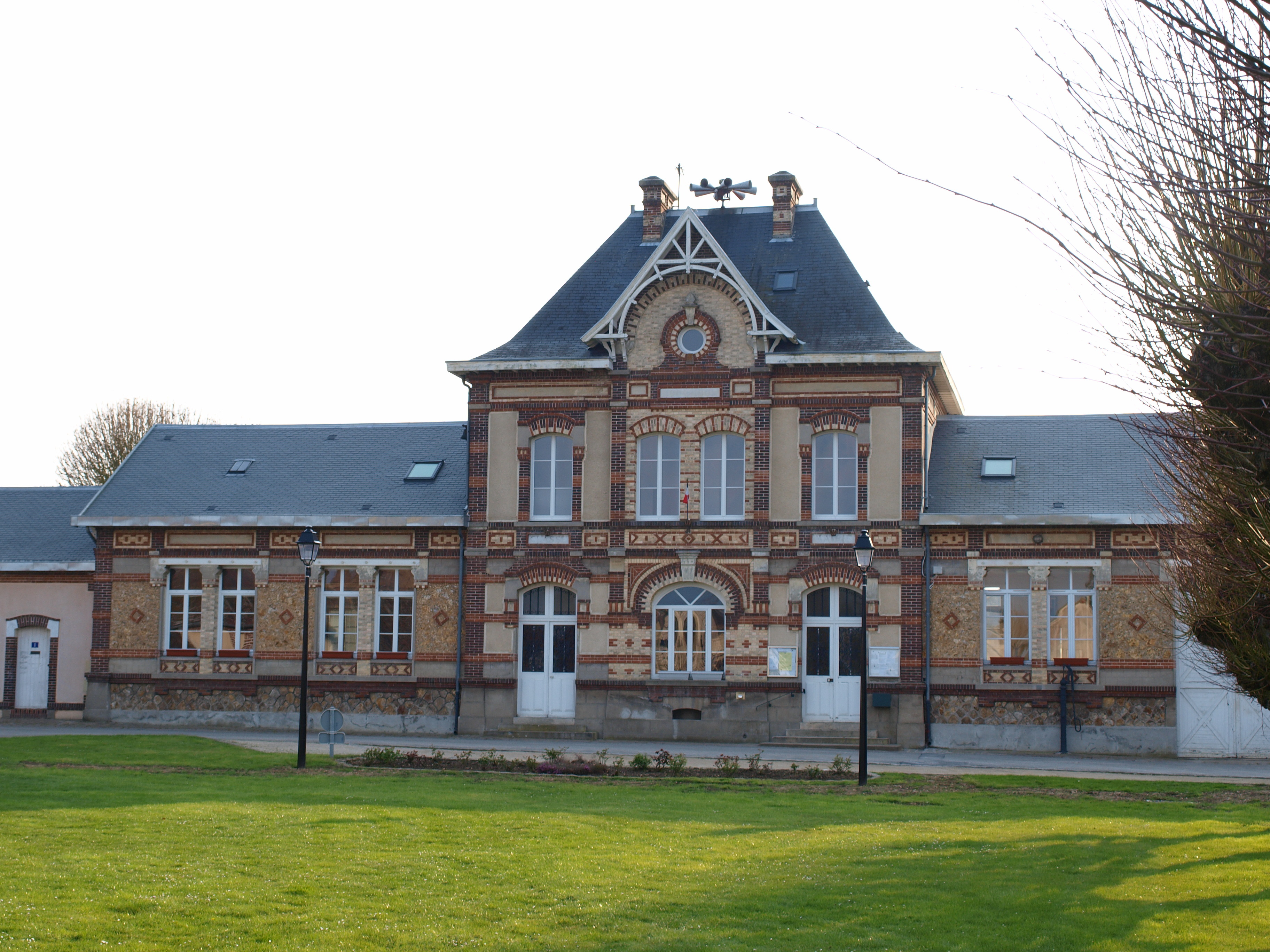 Saint-Laurent-la-Gâtine (Eure-et-Loir , France) ; la mairie à Boissy